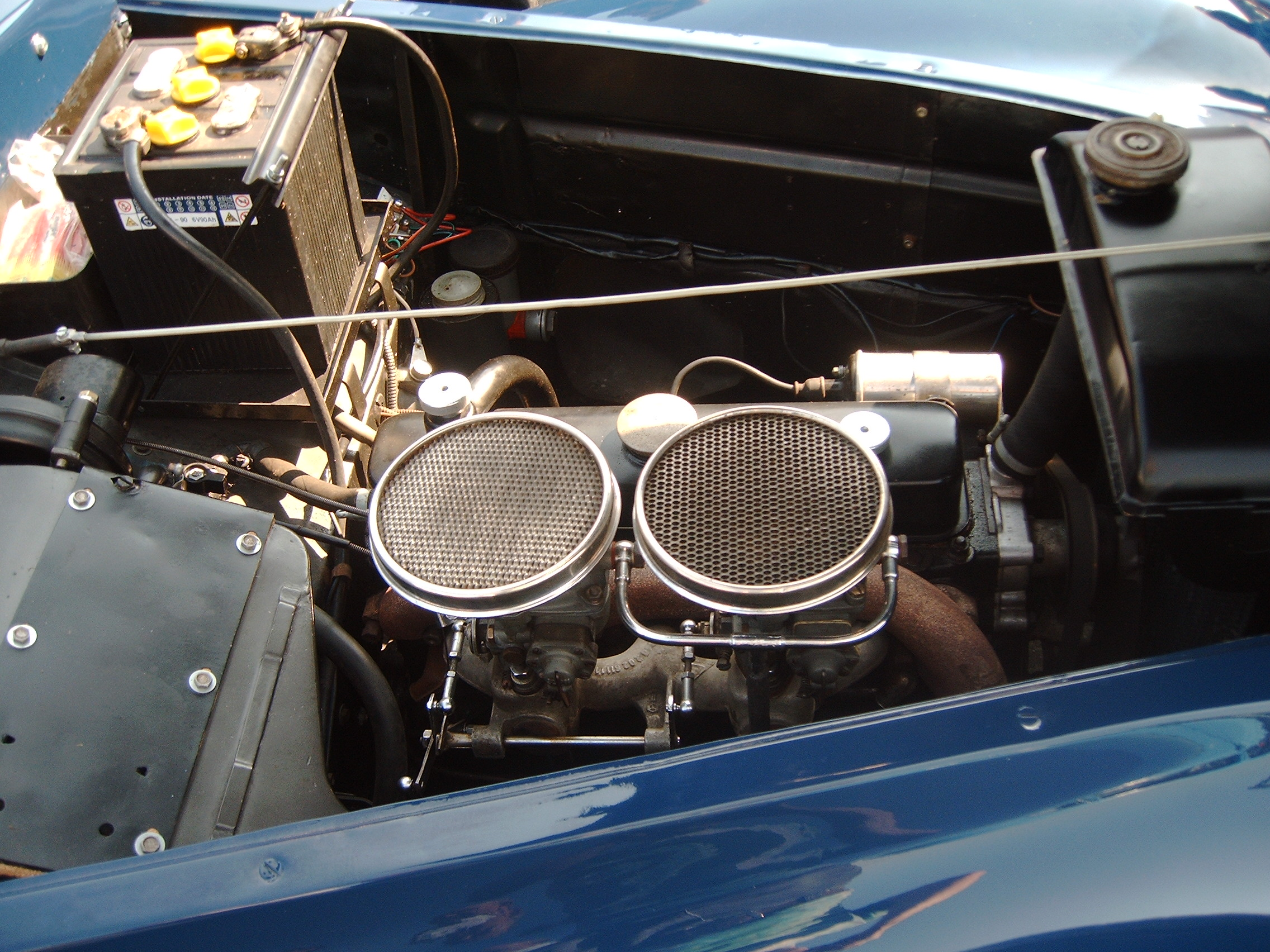 Eisenach, 04.09.2004 EMW 340 Motor